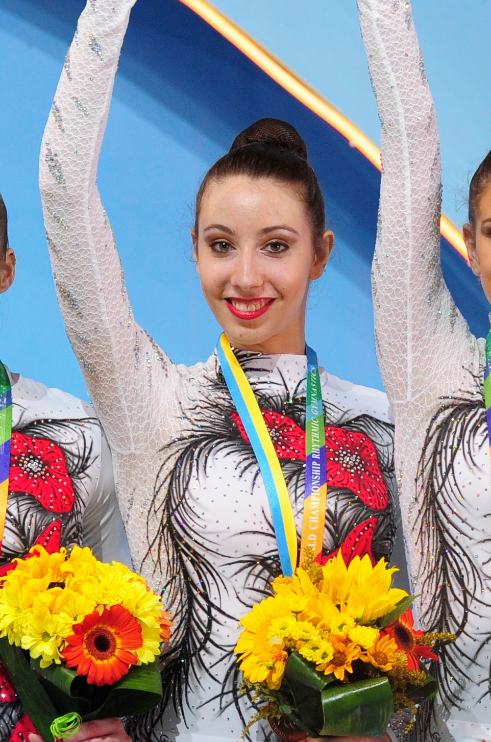 Artemi Gavezou con la medalla de bronce en el podio de la final de 3 pelotas y 2 cintas en el Campeonato Mundial de Kiev en 2013.